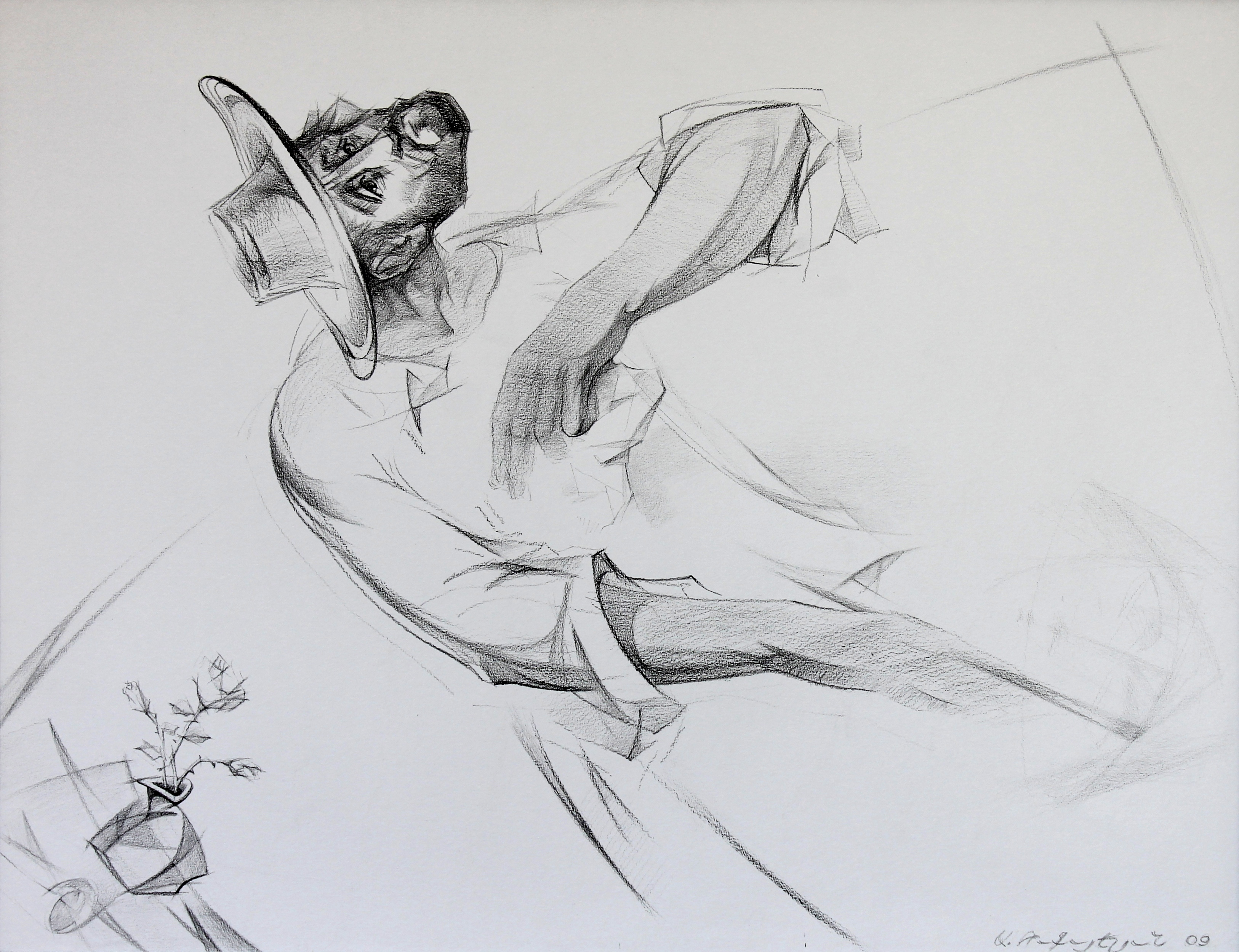 Գեղեցիկ է և փշոտ